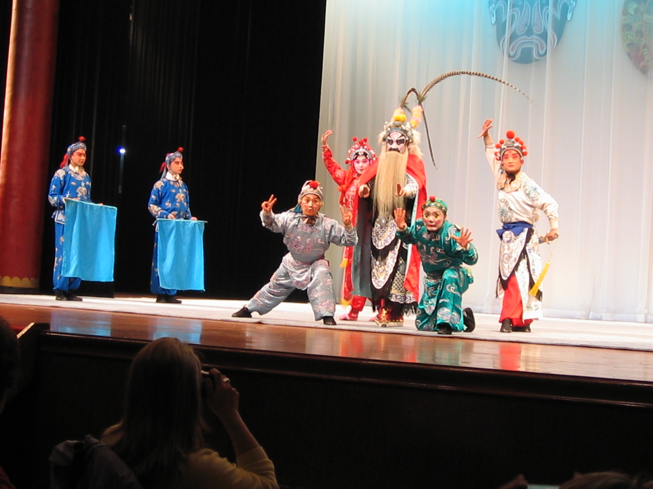 Peking Opera sampler